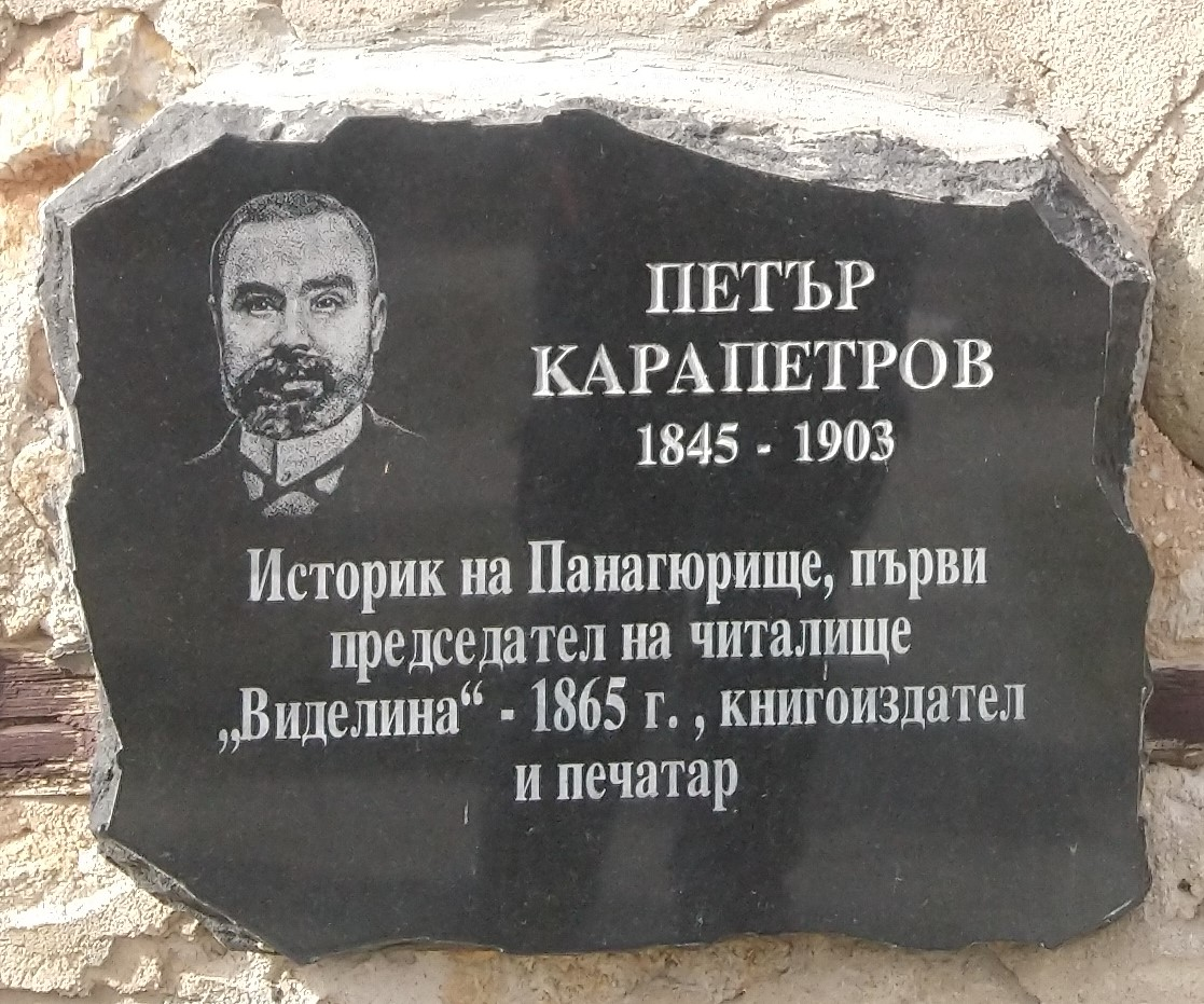 Петър Карапетров (1845 - 1903) - плоча в Исторически музей Панагюрище - Надпис: Историк на Панагюрище, първи председател на читалище "Виделина" - 1865 г., книгоиздател и печатар.